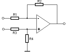 differentiÃ«le versterkerschakeling met opamp - kopie van Duitse wiki - auteur: Radizz - licentie:GNU FDL